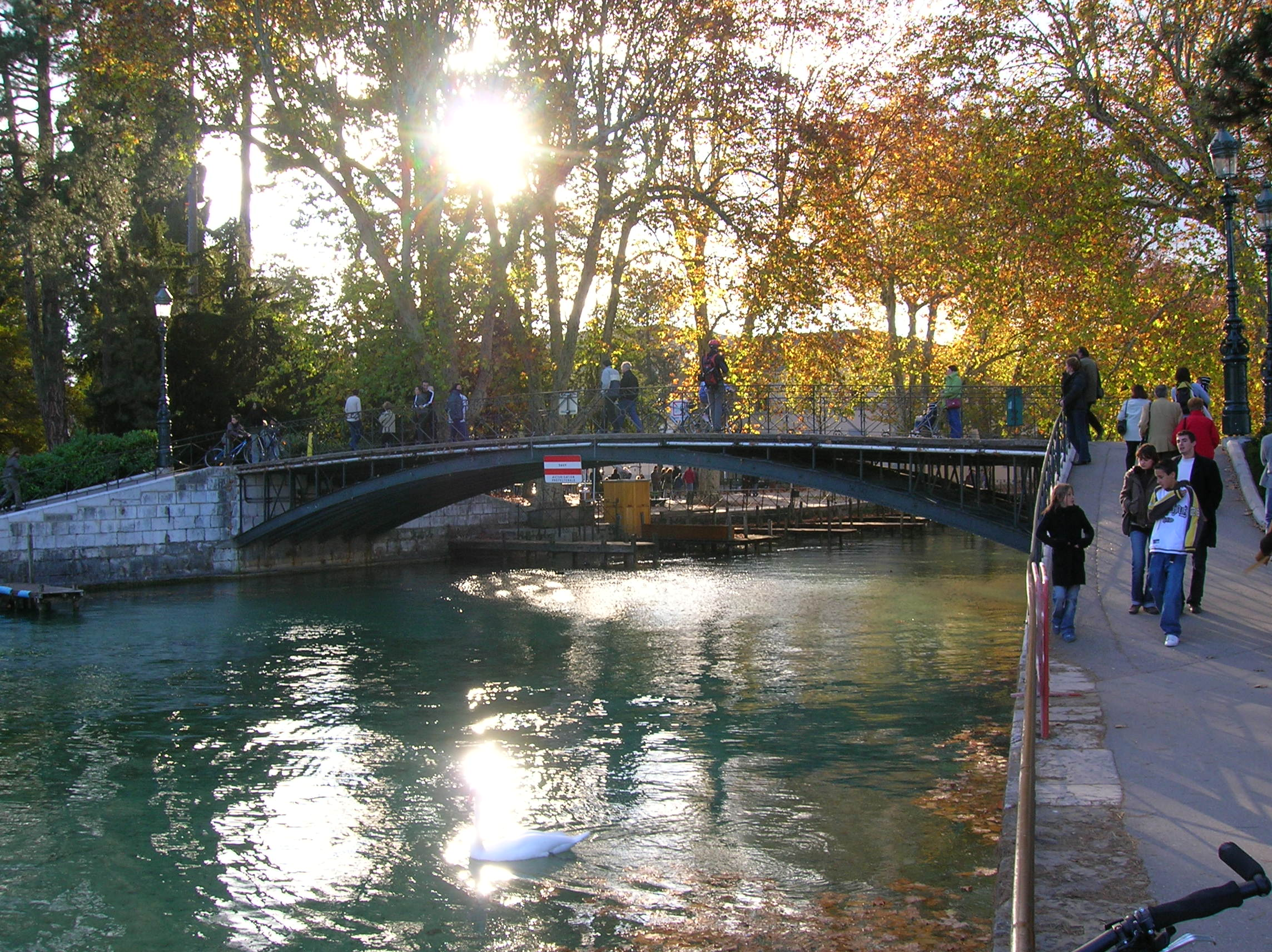 Annecy (Haute-Savoie, France) : Le pont des Amours sur le Thiou.